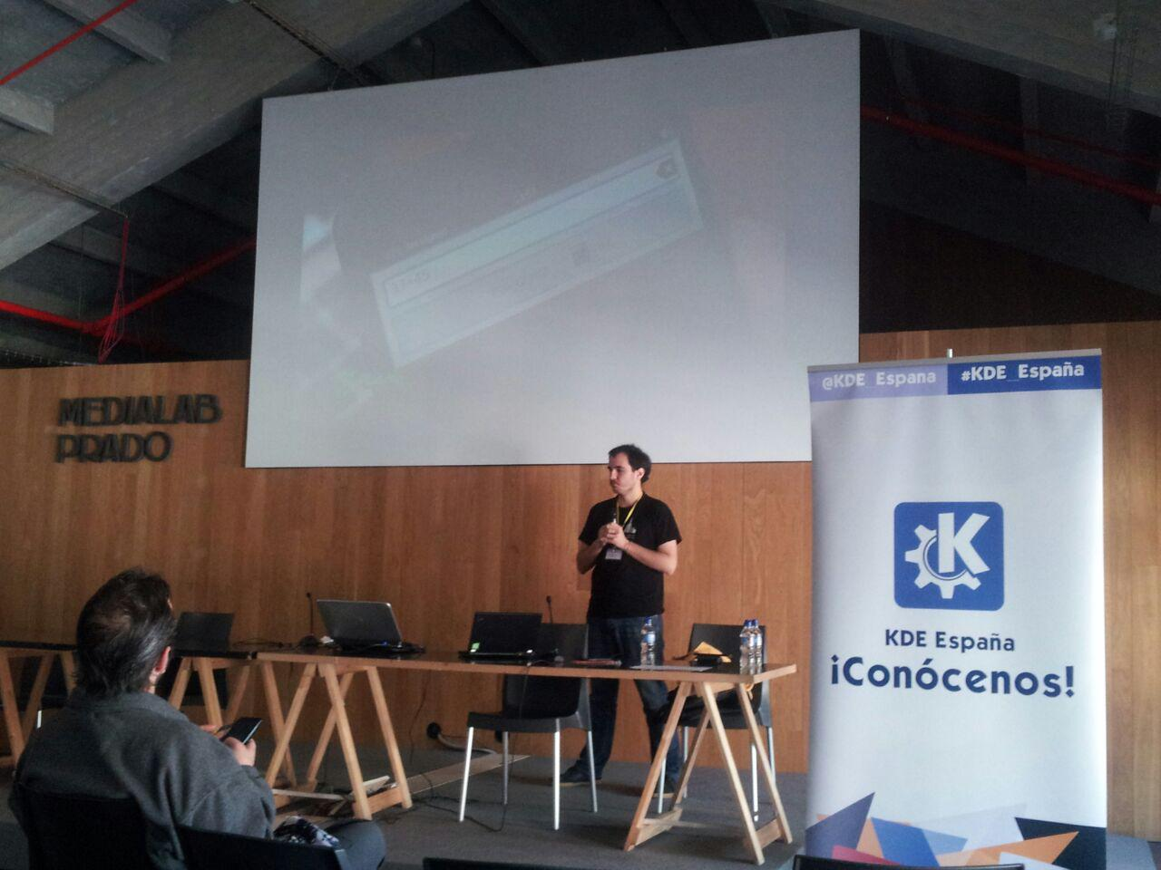 Charla durante la Akademy-es de KDE en Madrid